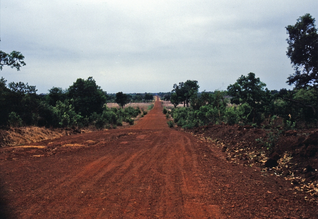 Northbank von Fatoto Richtung Basse; Kurz hinter Fatoto Richtung Basse